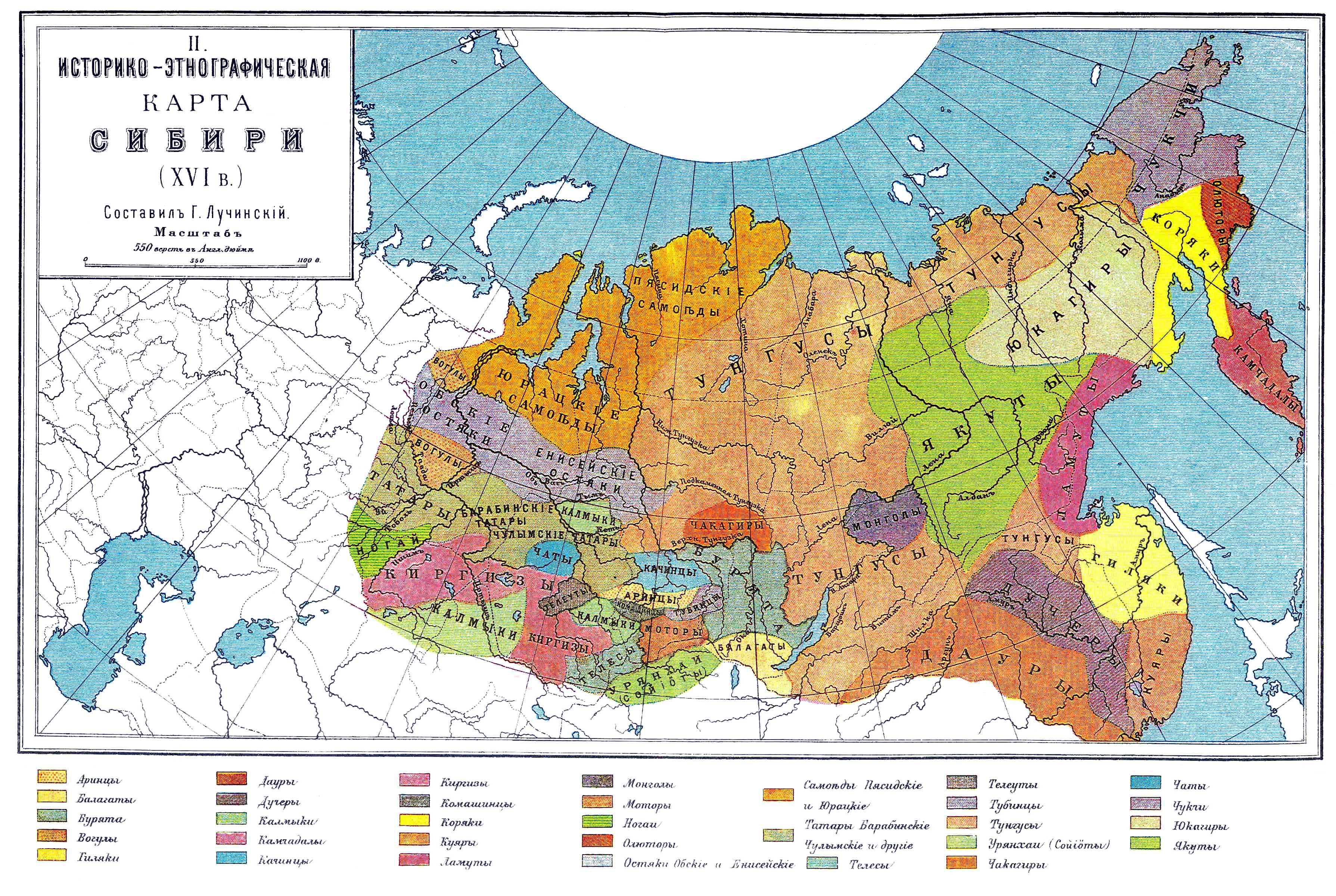 Историко-этнографическая карта Сибири XVI века. Иллюстрация из энциклопедии Брокгауза и Ефрона